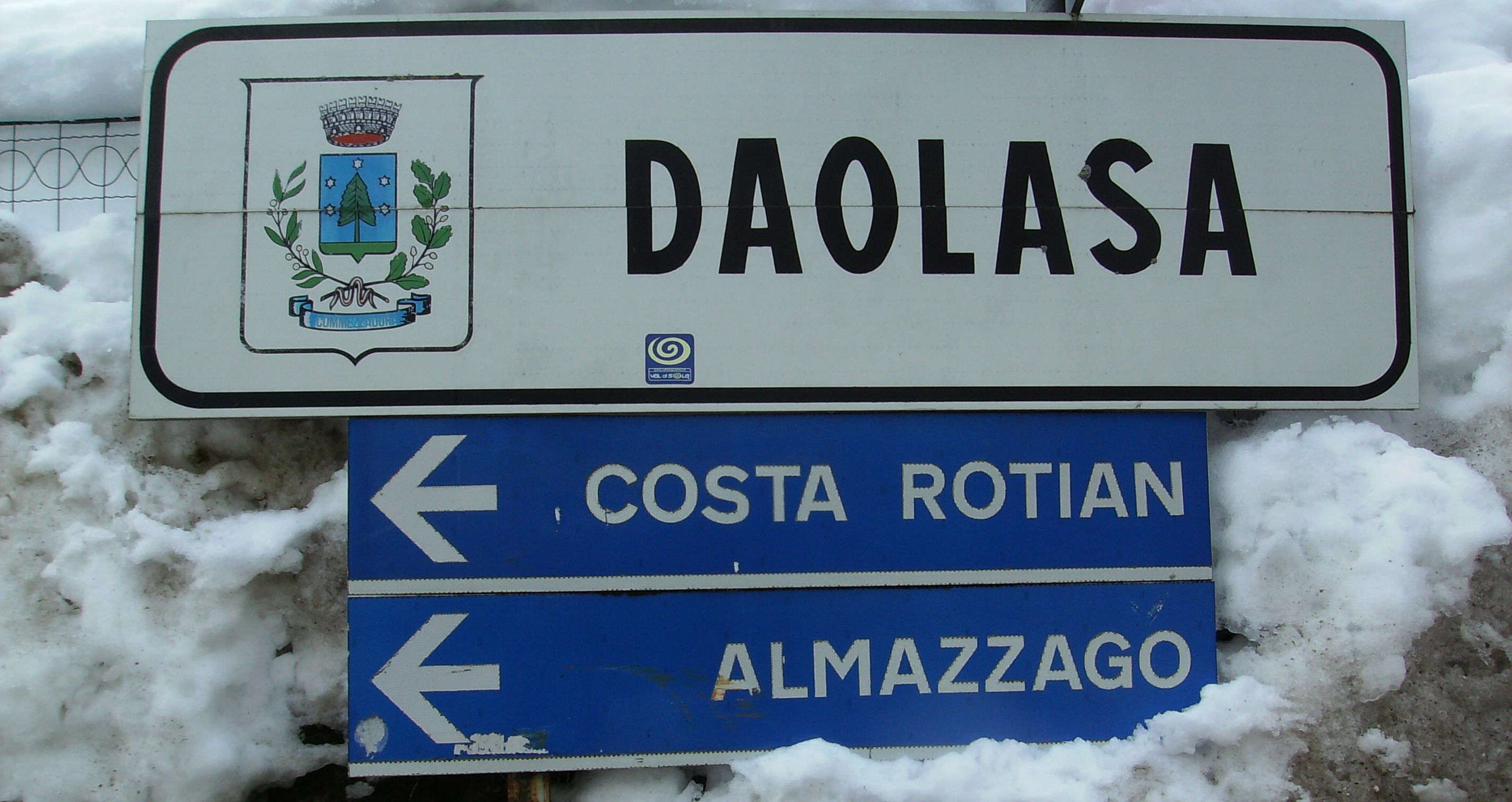 Daolasa - Commezzadura - Trento - Italie